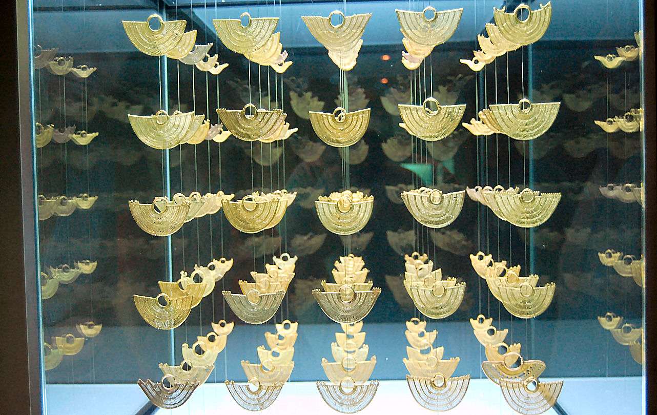 Cartagena de Indias (Colombia) museo del oro.